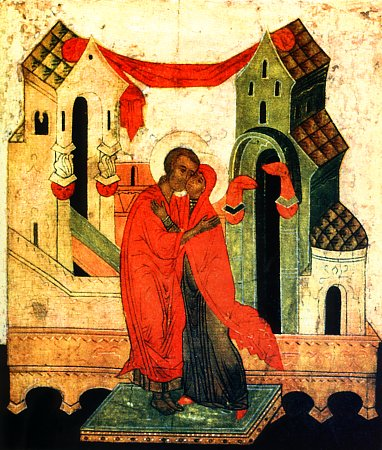 Зачатие праведной Анны. Икона XV века. Музей Реклингхаузен, Германия.